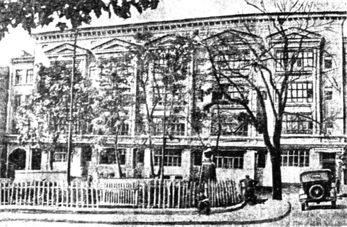 Перше приміщення школи ім. Лисенка у Києві.